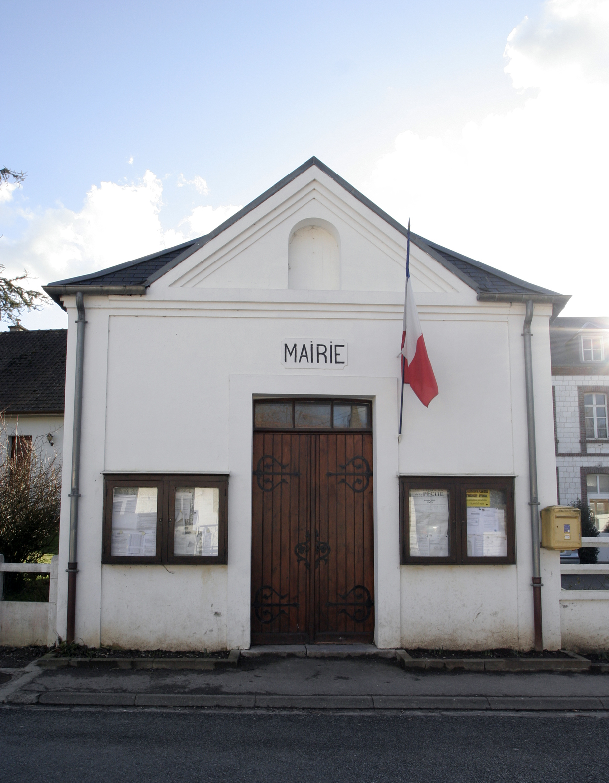 Estrée mairie